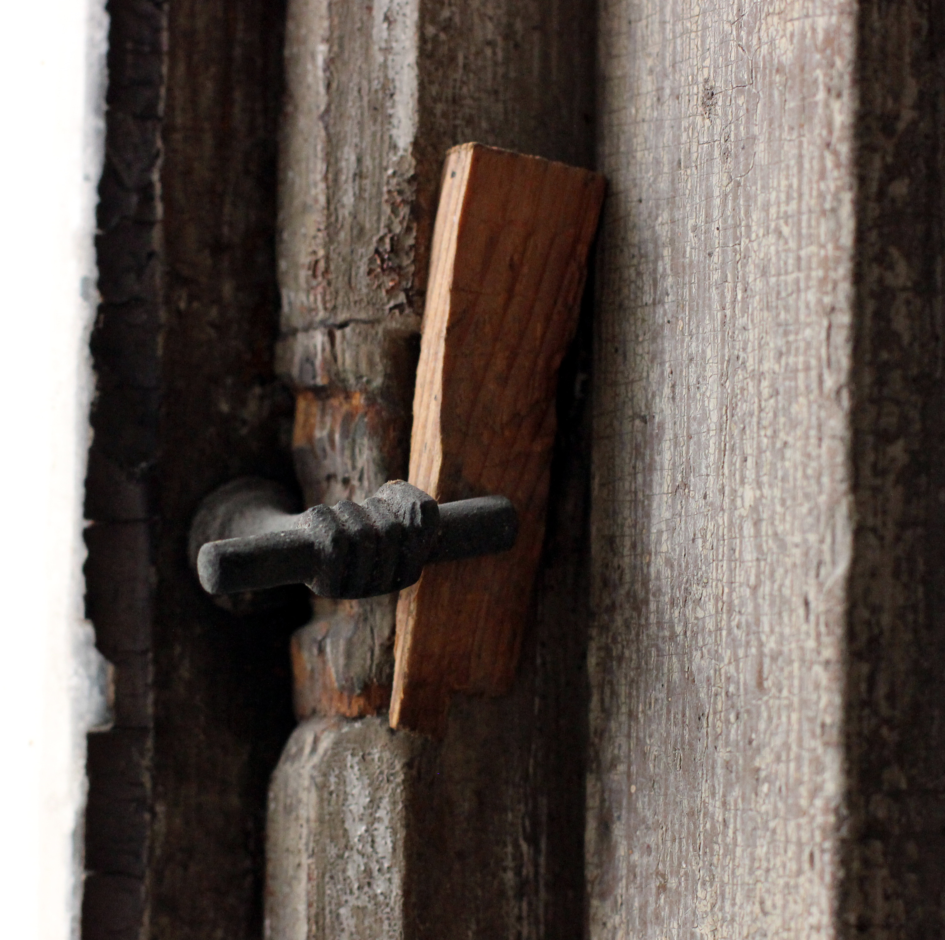 Historischer Fensterverschluss im Beginenhaus, Kempten